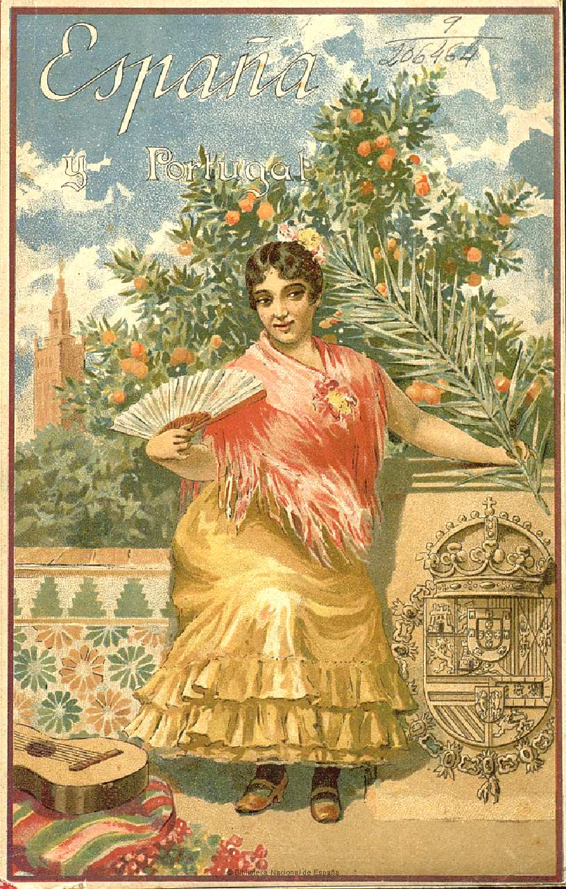 España y Portugal : su historia, su geografía, su arte y sus costumbres ; Alfredo Opisso Autor: Opisso, Alfredo (1847-1924) Fecha: 1896 Datos de edición: Barcelona, Librería de Antonio J. Bastinos